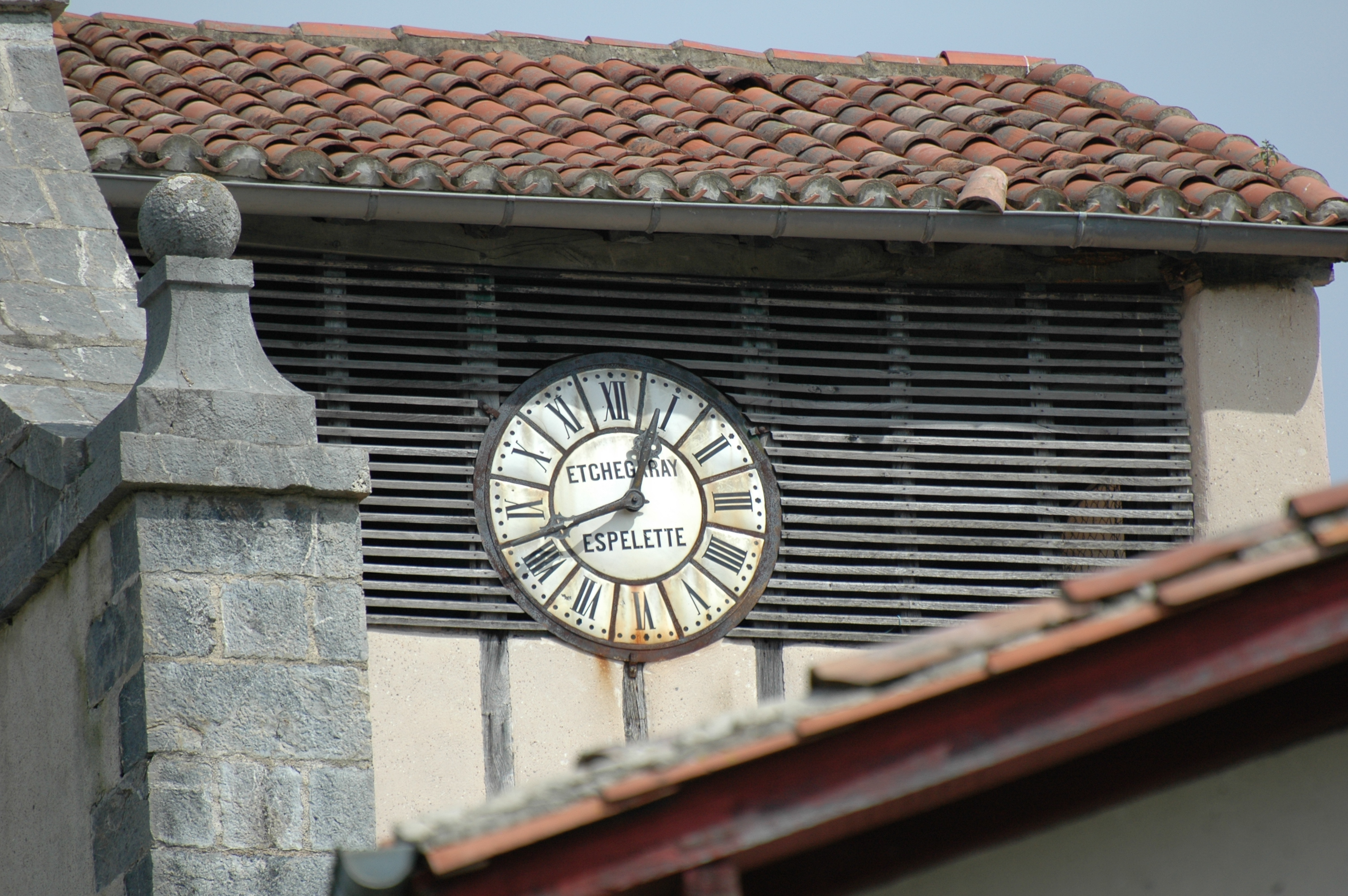 Mendionde, Pyrénées Atlantiques, France, quartier Lekorne, église du XVième siècle, horloge provenant d'Espelette